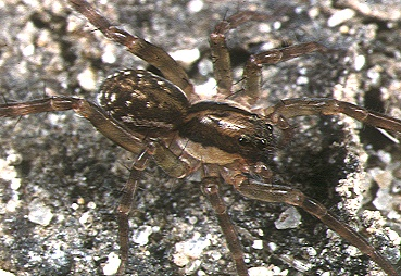 female Pirata iriomotensis from Okinawa.